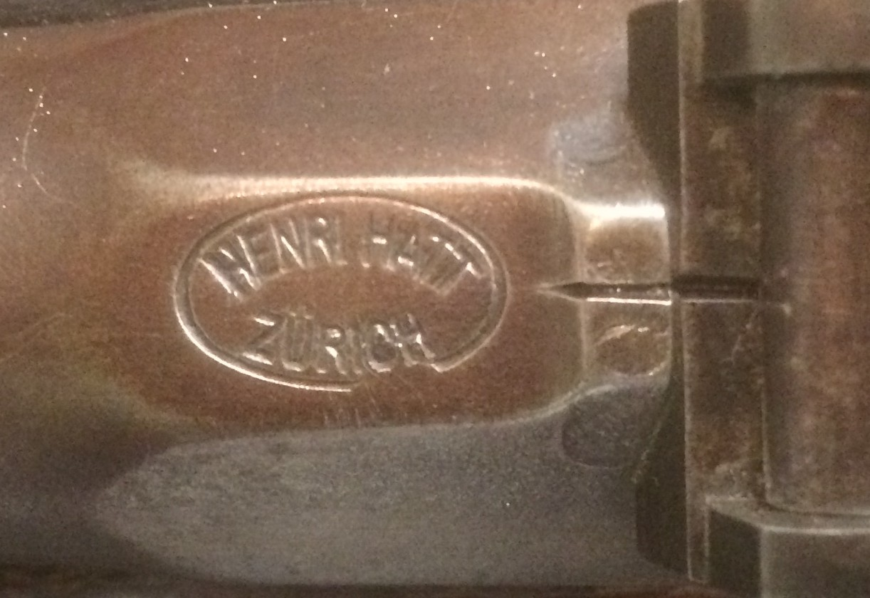 Poinçon de l'armurier Henri Hatt à Zurich, relevé sur une carabine de tir